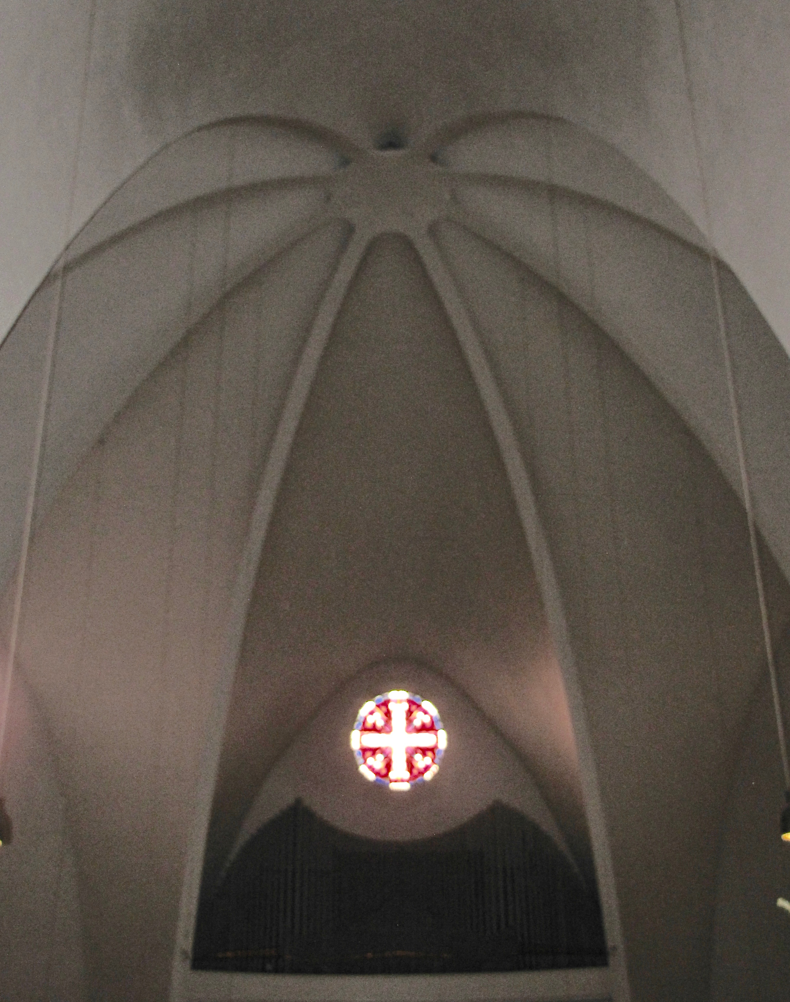 St. Engelbert (Köln-Riehl): Im Gewölbescheitel des Zentralbaus laufen die acht tragenden Betonrippen zu einem Stern zusammen. Die starkfarbige Verglasung der Okuli halten den Hauptraum in gedämpften Licht, so dass sich der Scheitel im Dunkel verliert